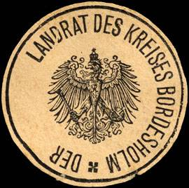 Sealing stamp Title: Der Landrat des Kreises Bordesholm Description: grau, schwarz Place: Bordesholm size: 3 cm